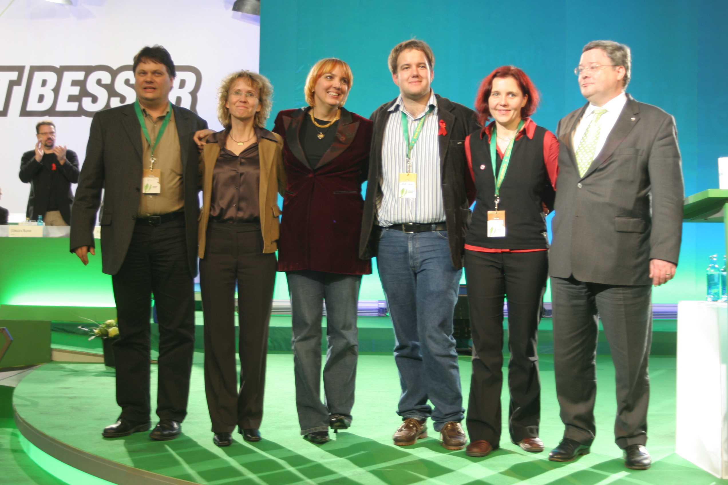 Bundesvorstand von Bündnis 90/Die Grünen, gewählt im November 2006 auf dem Parteitag in Köln. Von links: Dietmar Strehl, Steffi Lemke, Claudia Roth, Malte Spitz, Astrid Rothe-Beinlich, Reinhard Bütikofer